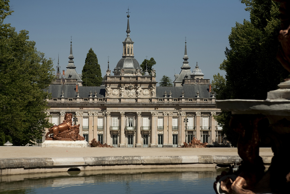 unidentified Spain